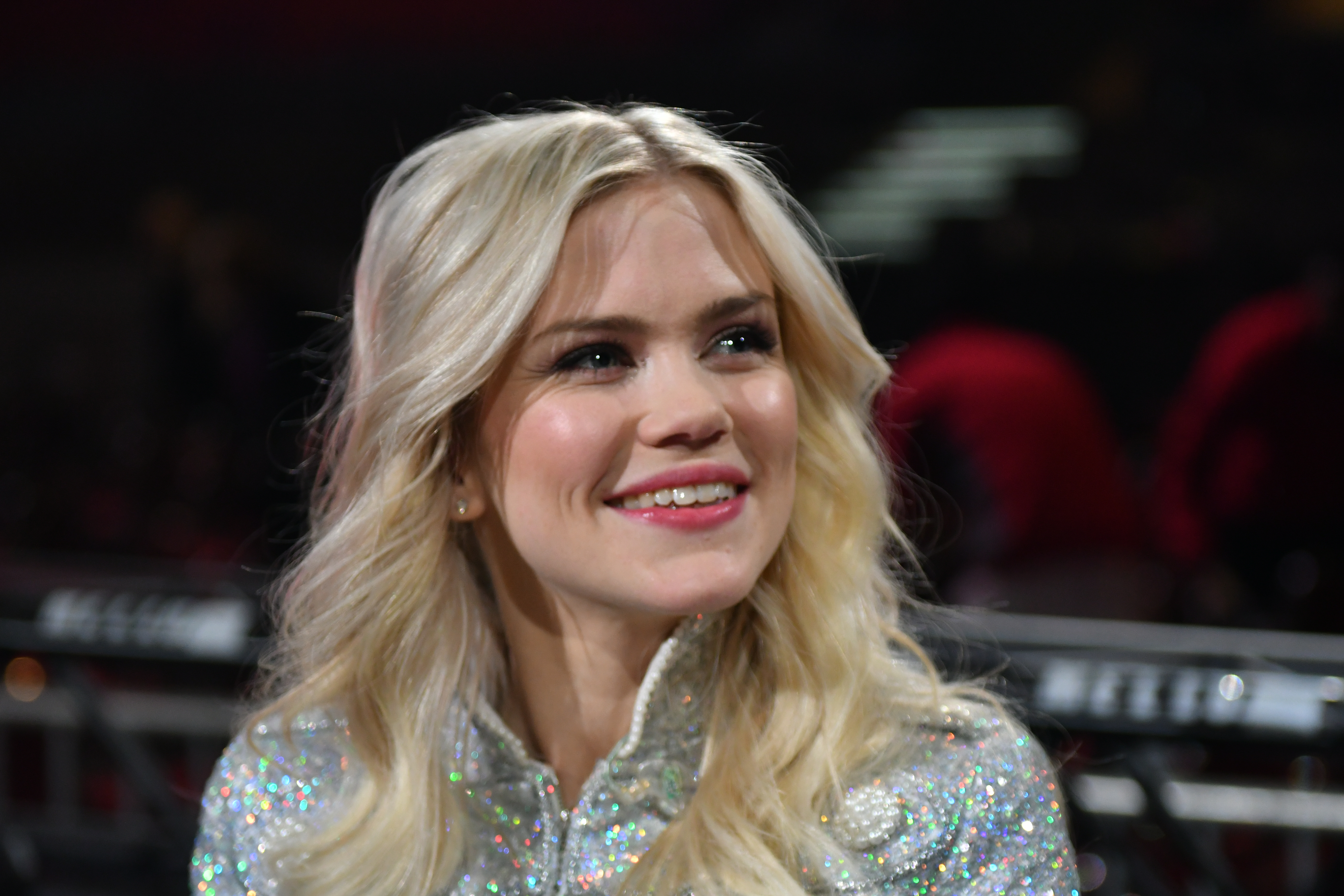 Melodifestivalen 2018, Deltävling 2 , Scandinavium, Göteborg, Ida Redig